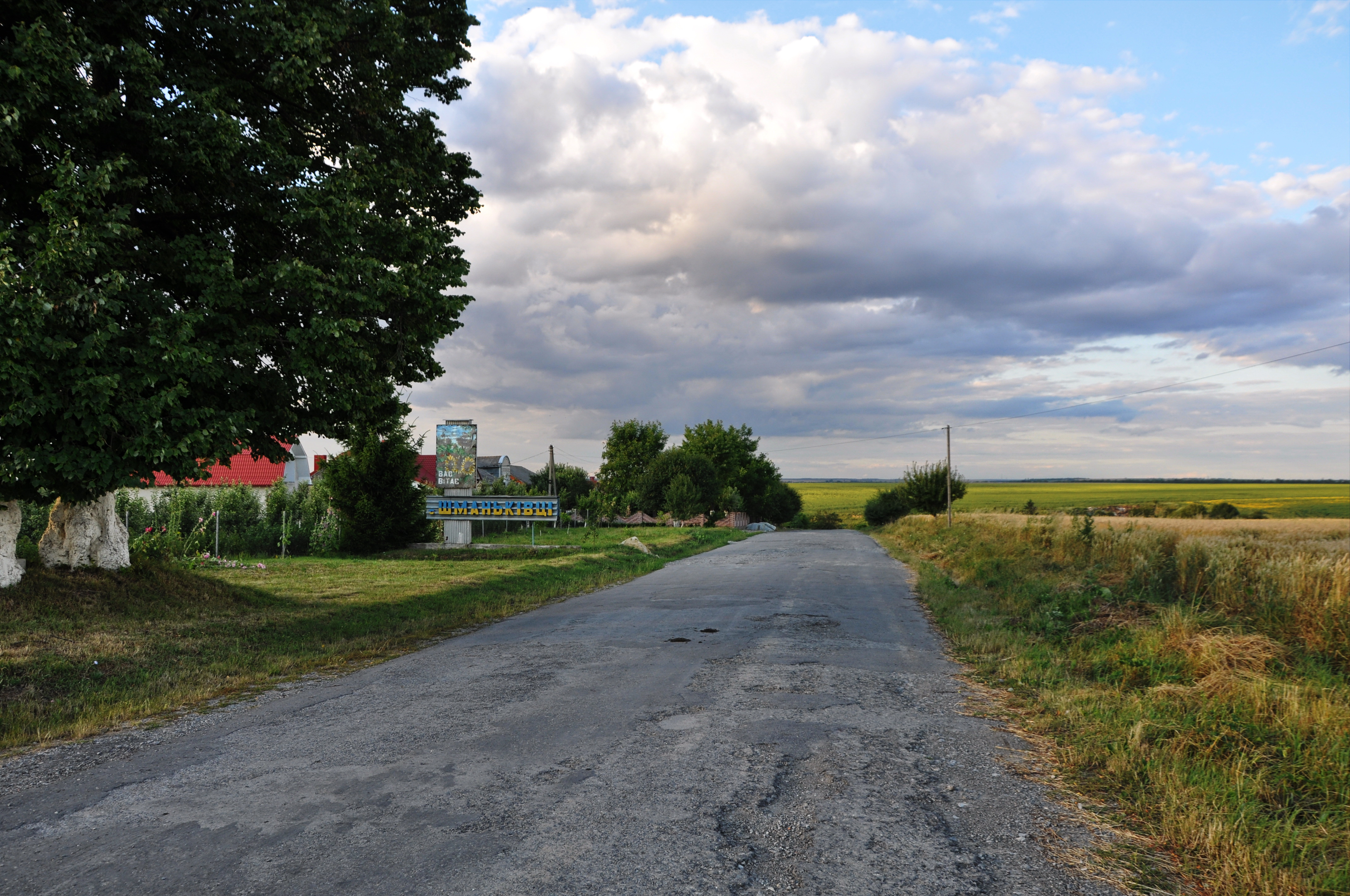 В'їзд в село Шманьківці Чортківського району Тернопільської області України.